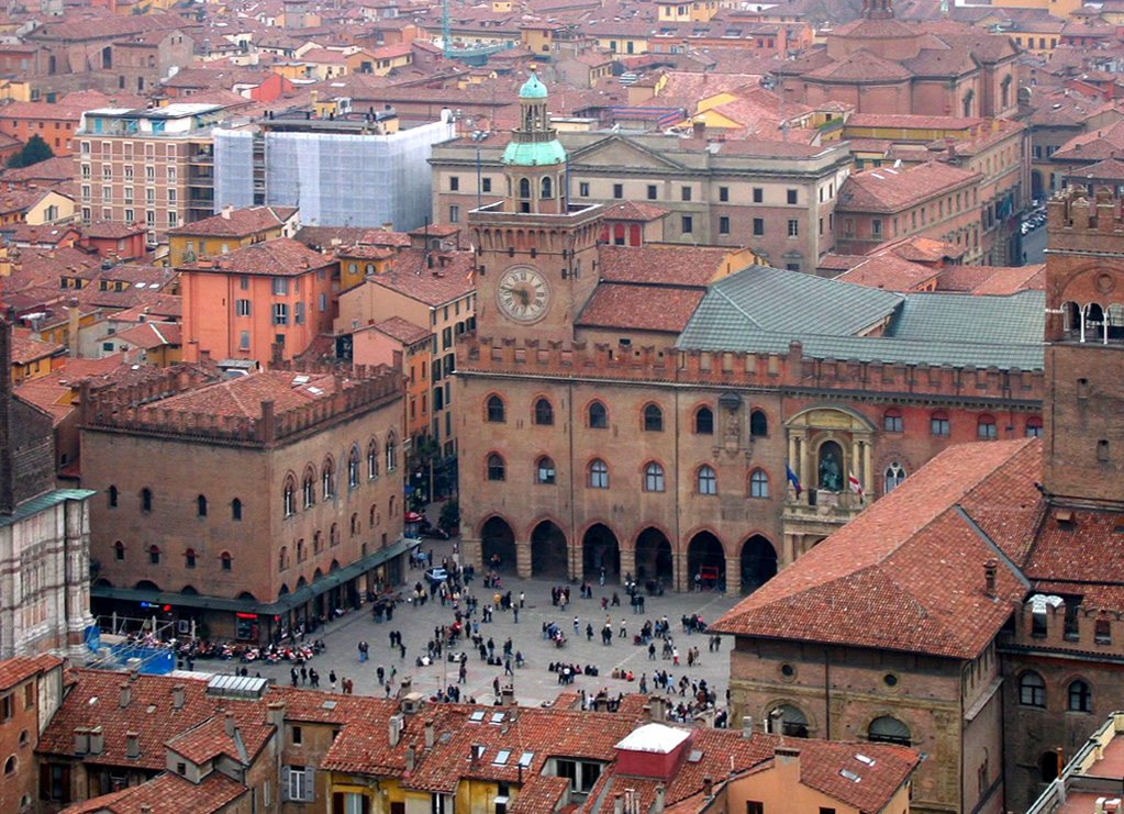 Il Palazzo dei notai (a sin.) e Palazzo d'Accursio, in Piazza Maggiore a Bologna, Italia.